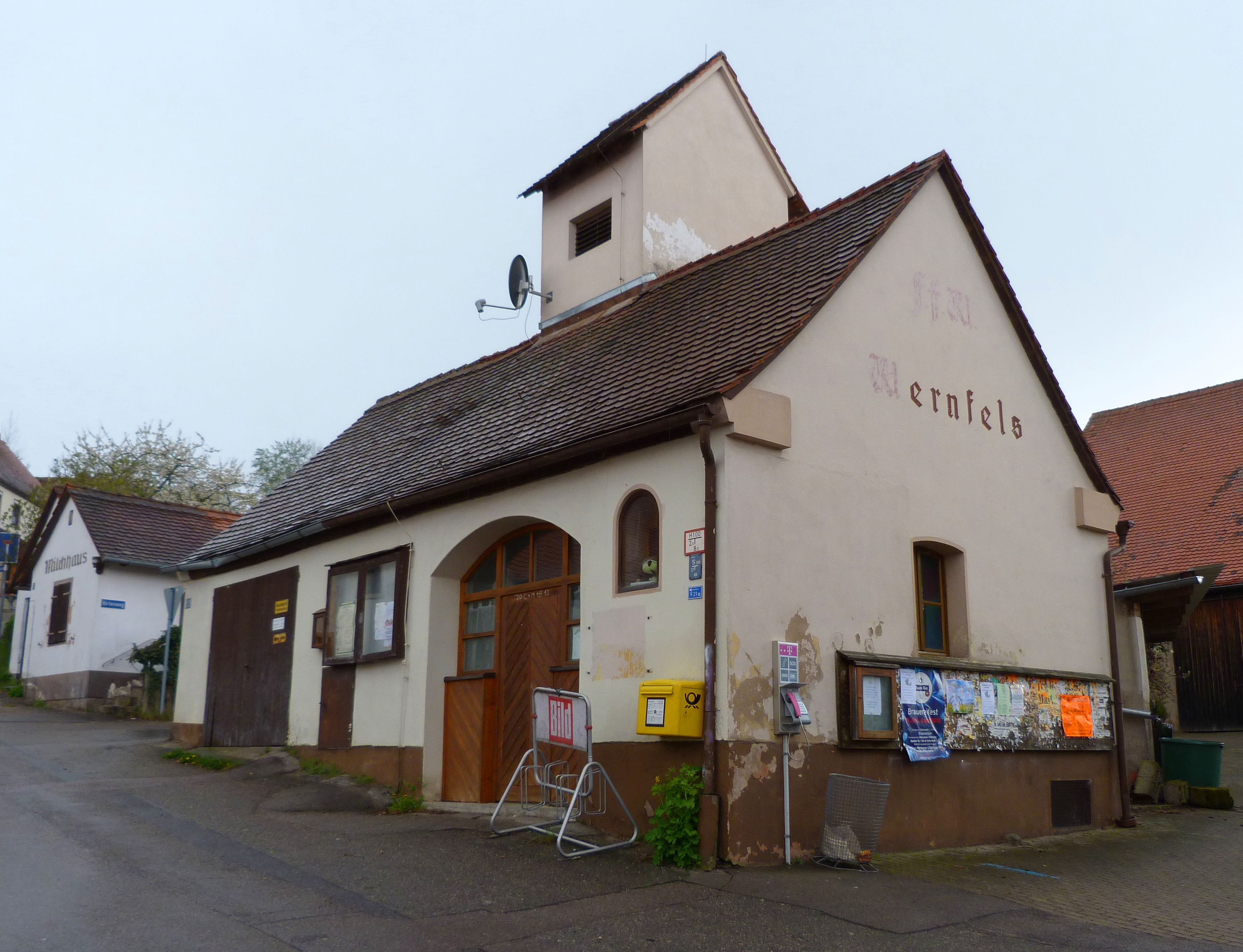 Altes Feuerwehrhaus der FFW Wernfels, jetzt Jugendtreff am Dorfplatz